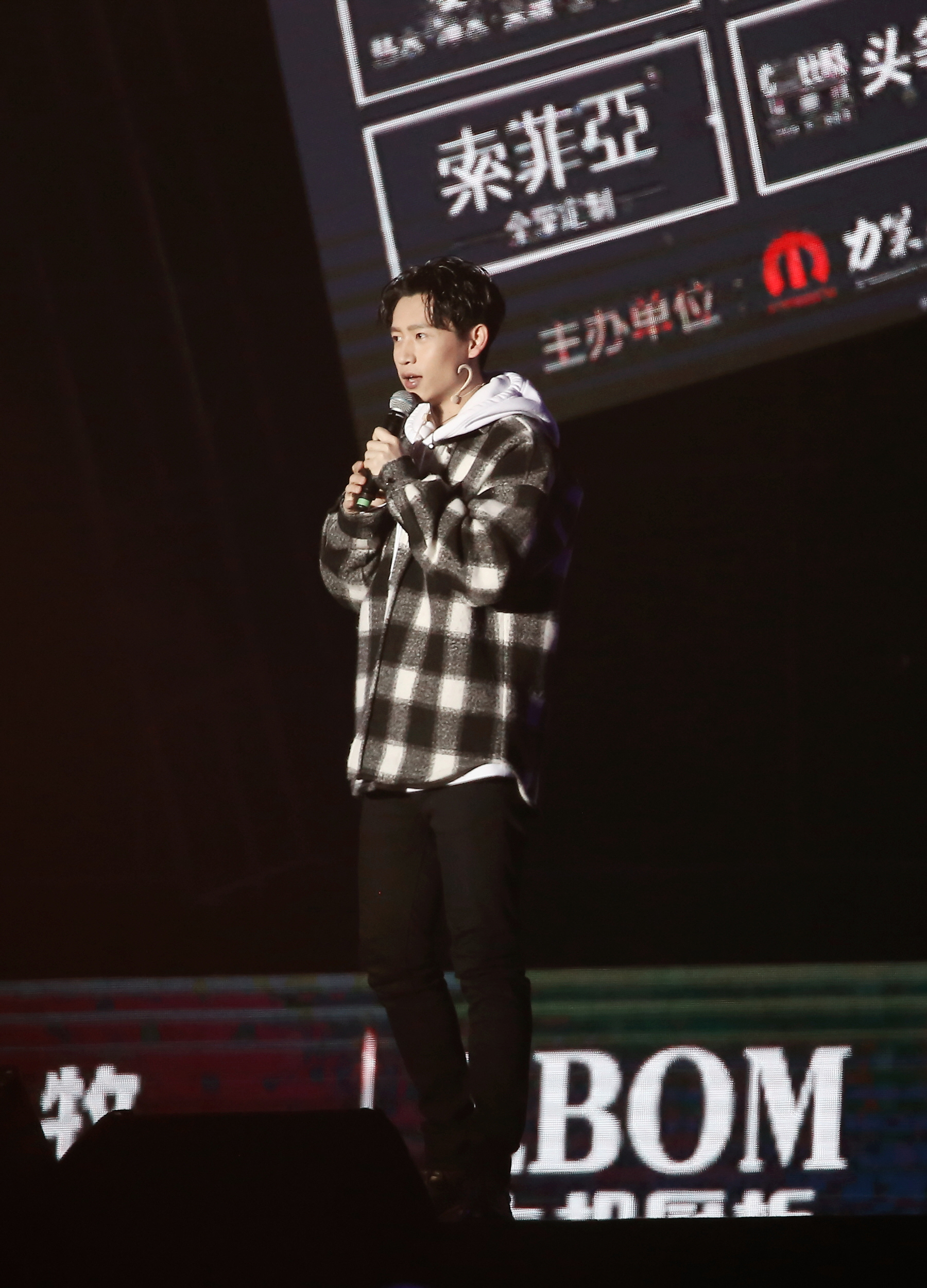 2017.3.25 红星美凯龙群星演唱会 魏晨